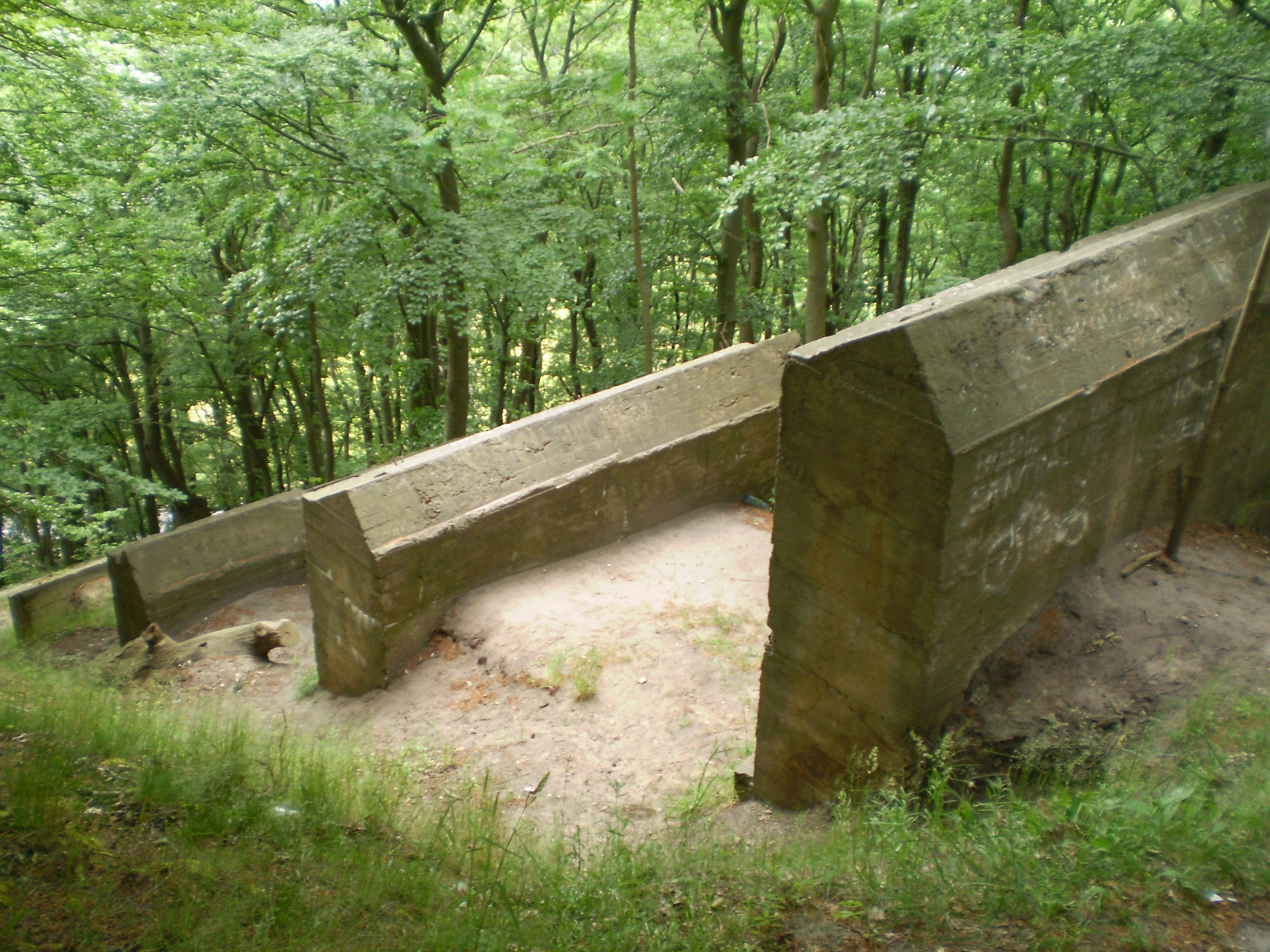 resztki instalacji V-3 koło Międzyzdrojów